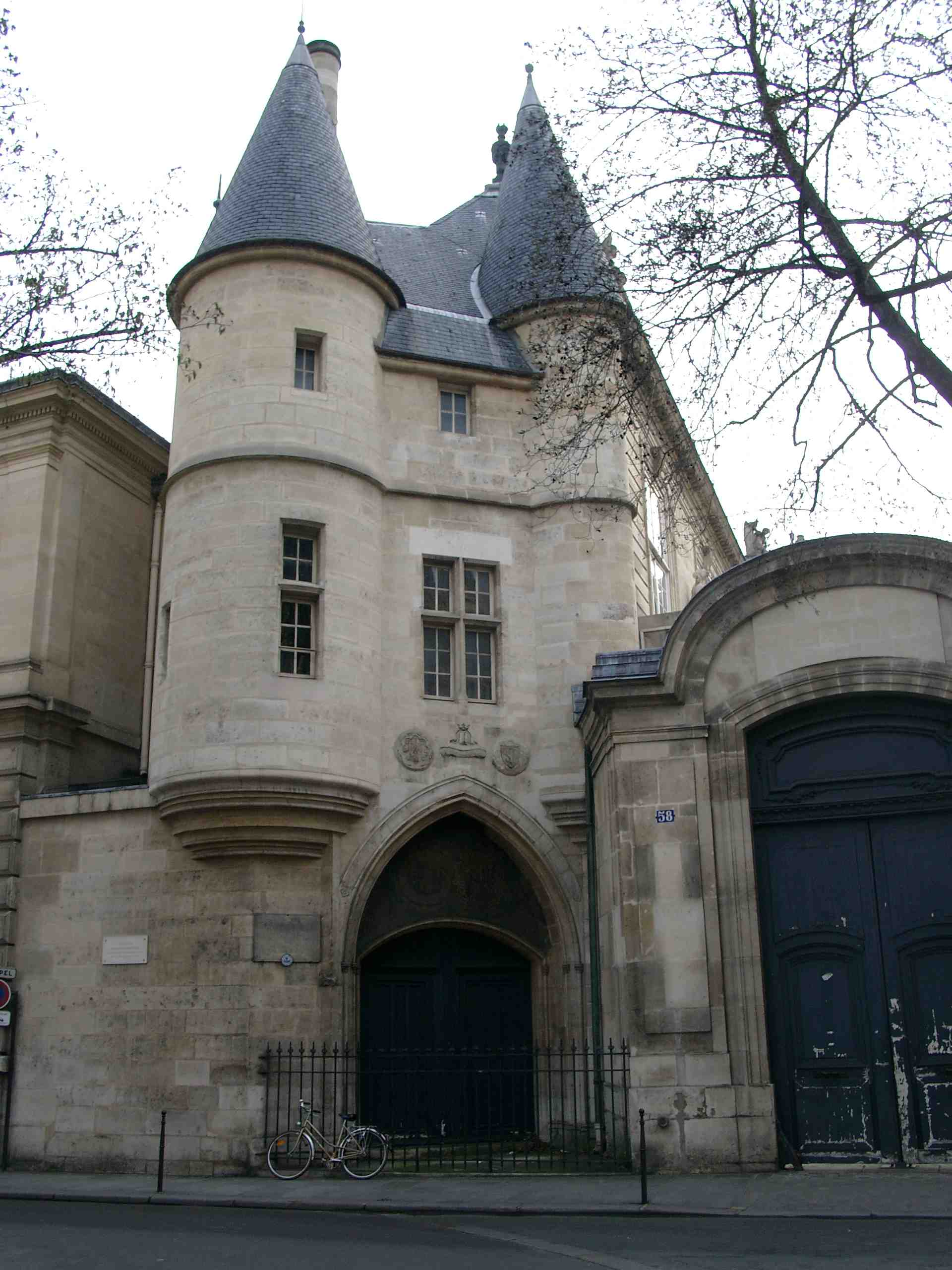 Portail de l'ancien Hôtel de Clisson, 58 rue des Archives, dans le Marais à Paris (IIIe arrondissement). Ce portail, seul vestige de l'ancien hôtel particulier d'Olivier de Clisson, date de la fin du XIVe siècle.